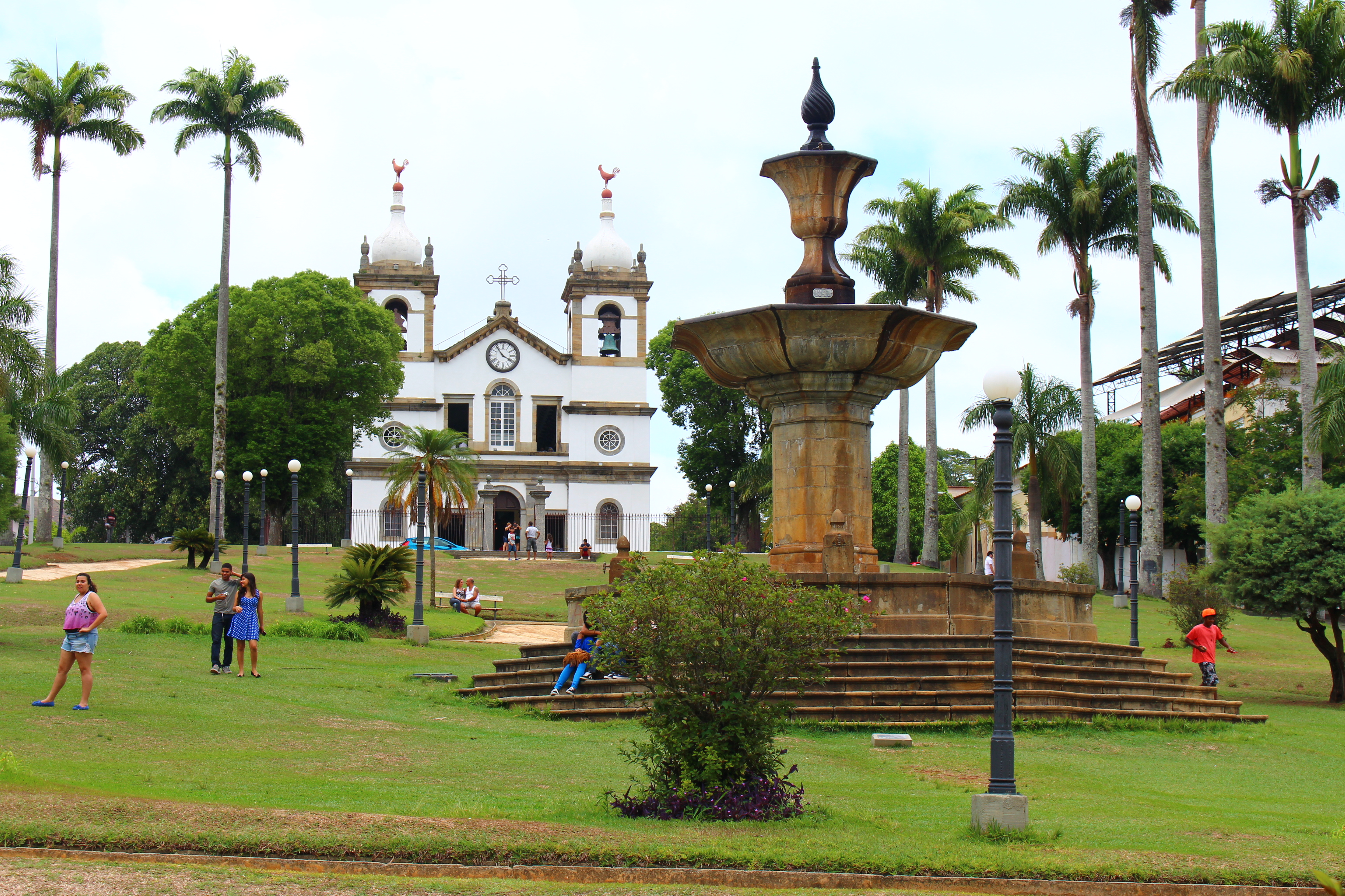 Conjunto Paisagístico e Urbanístico da Cidade de Vassouras, demarcado no processo, constituído de construções públicas e particulares, incluindo calçamento e arborização.